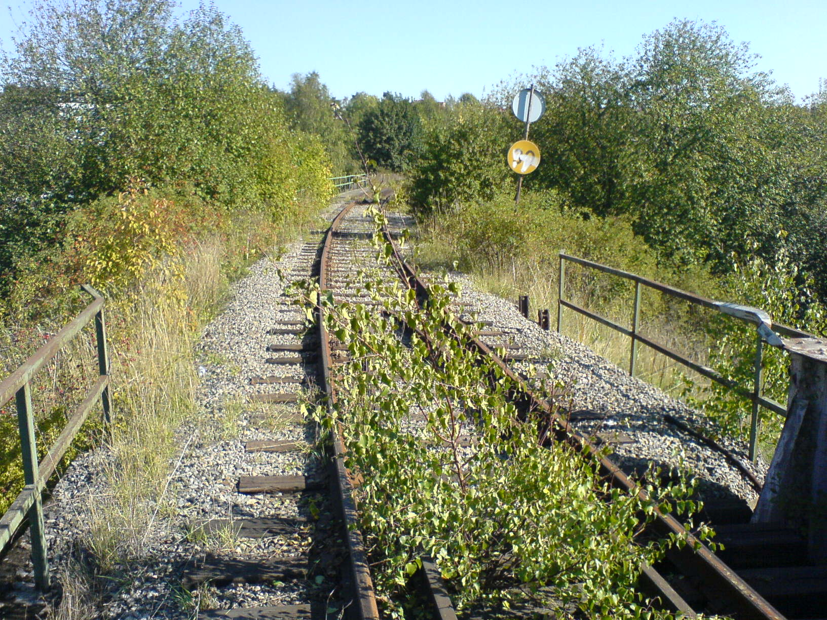 Ulvsundabanan passerar Bällstaån. Strax innan rivningen